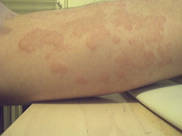 Quaddeln bei Allergie (Original text: Quaddelbildung bei einer Allergie)